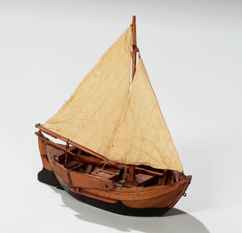 model kubboot